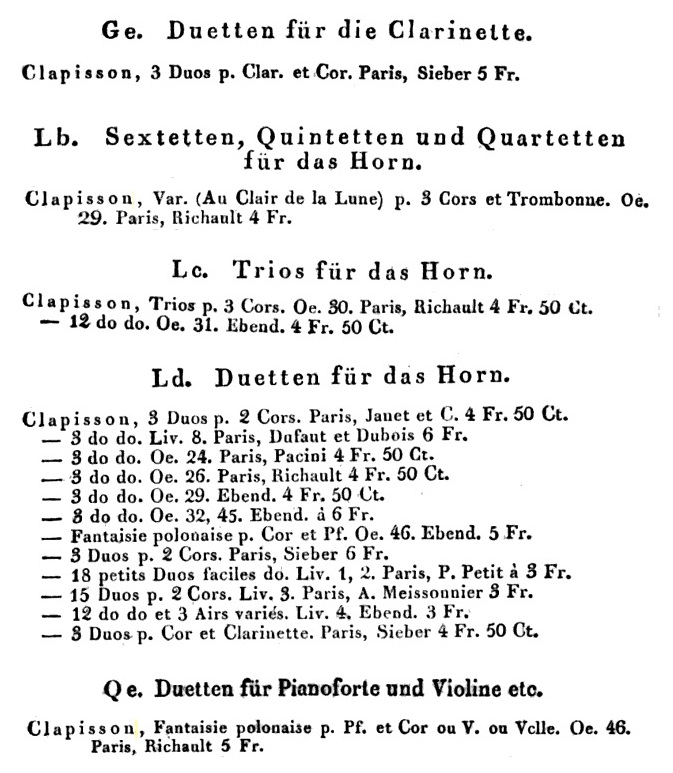 Liste des oeuvres d'Antoine Clapisson disponible sur catalogue en 1828